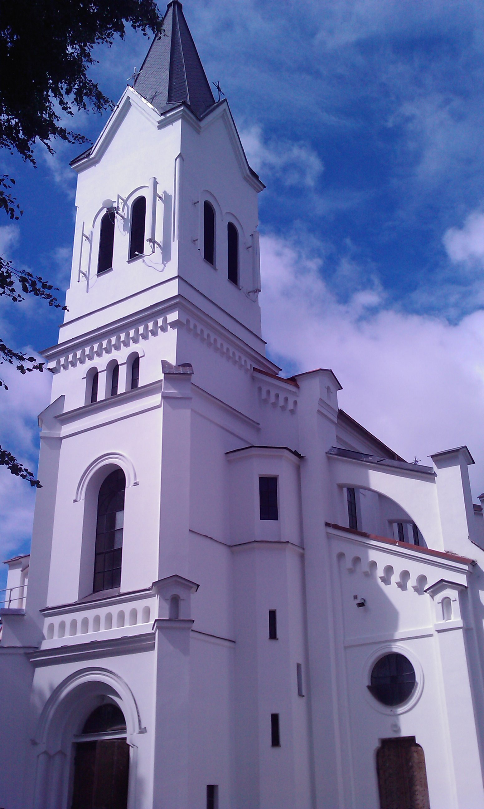 Kościół w Krypnie Kościelnym